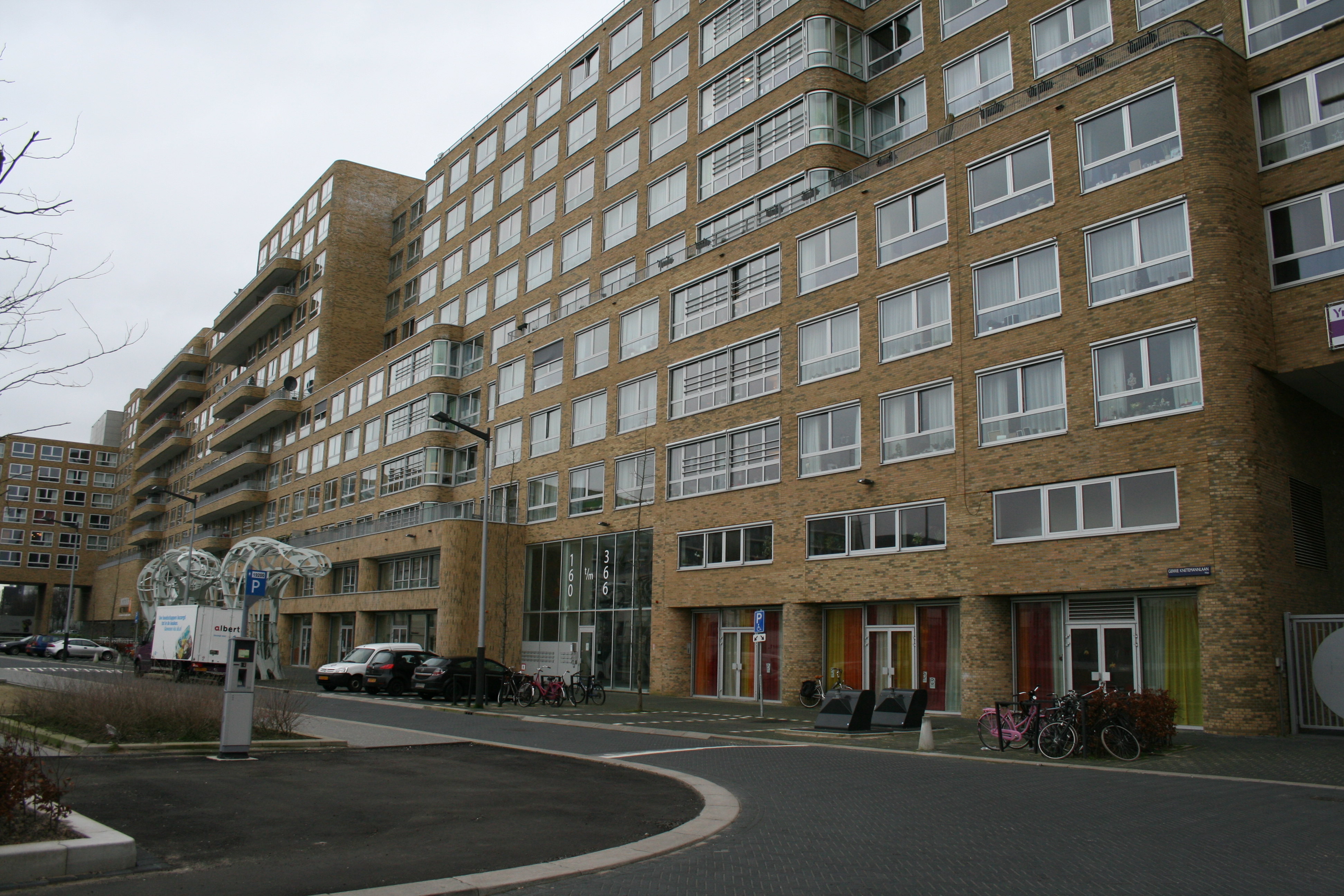 Gebouw 'De Tribune' (ontwerp: Claus & Kaan Architecten), Gerrie Knetemannlaan, Amsterdam Bos en Lommer, 31 december 2012.